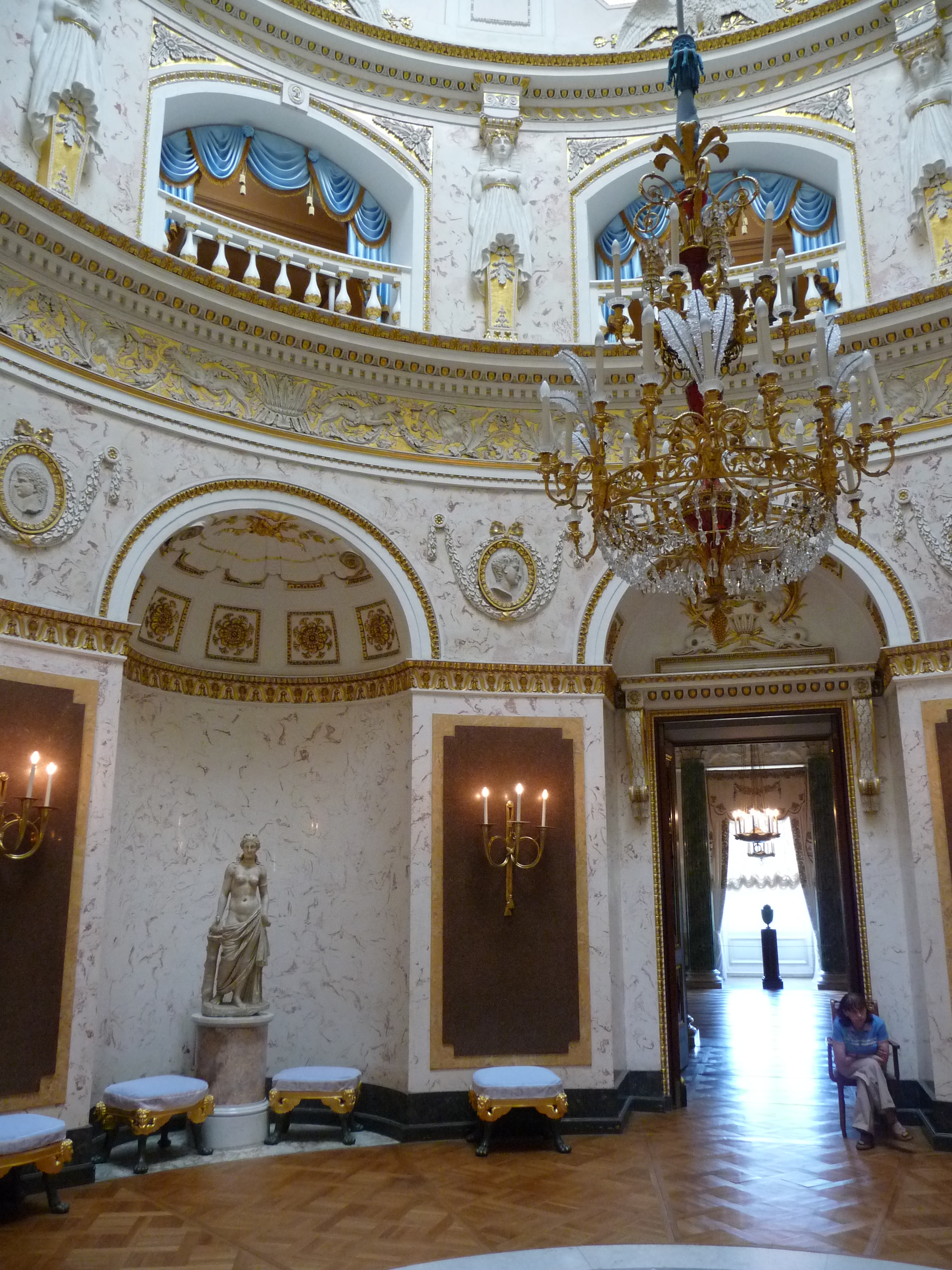 Palace-p1030750.jpg